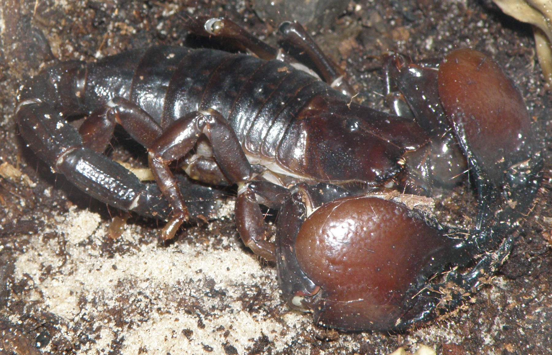 Skorpion (Scorpion), Ogród Zoologiczny w Warszawie